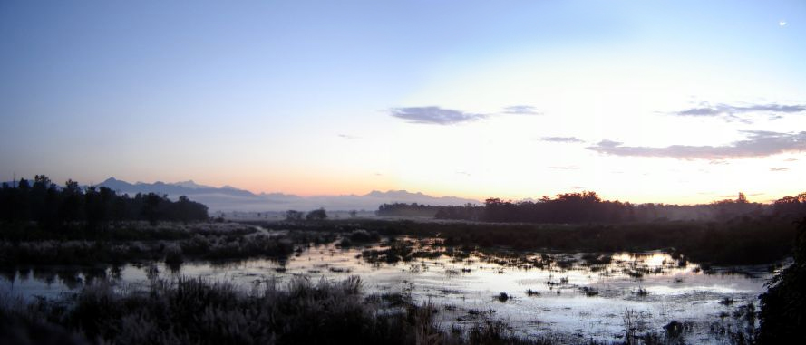 Park Narodowy Chitwan - rejon północny